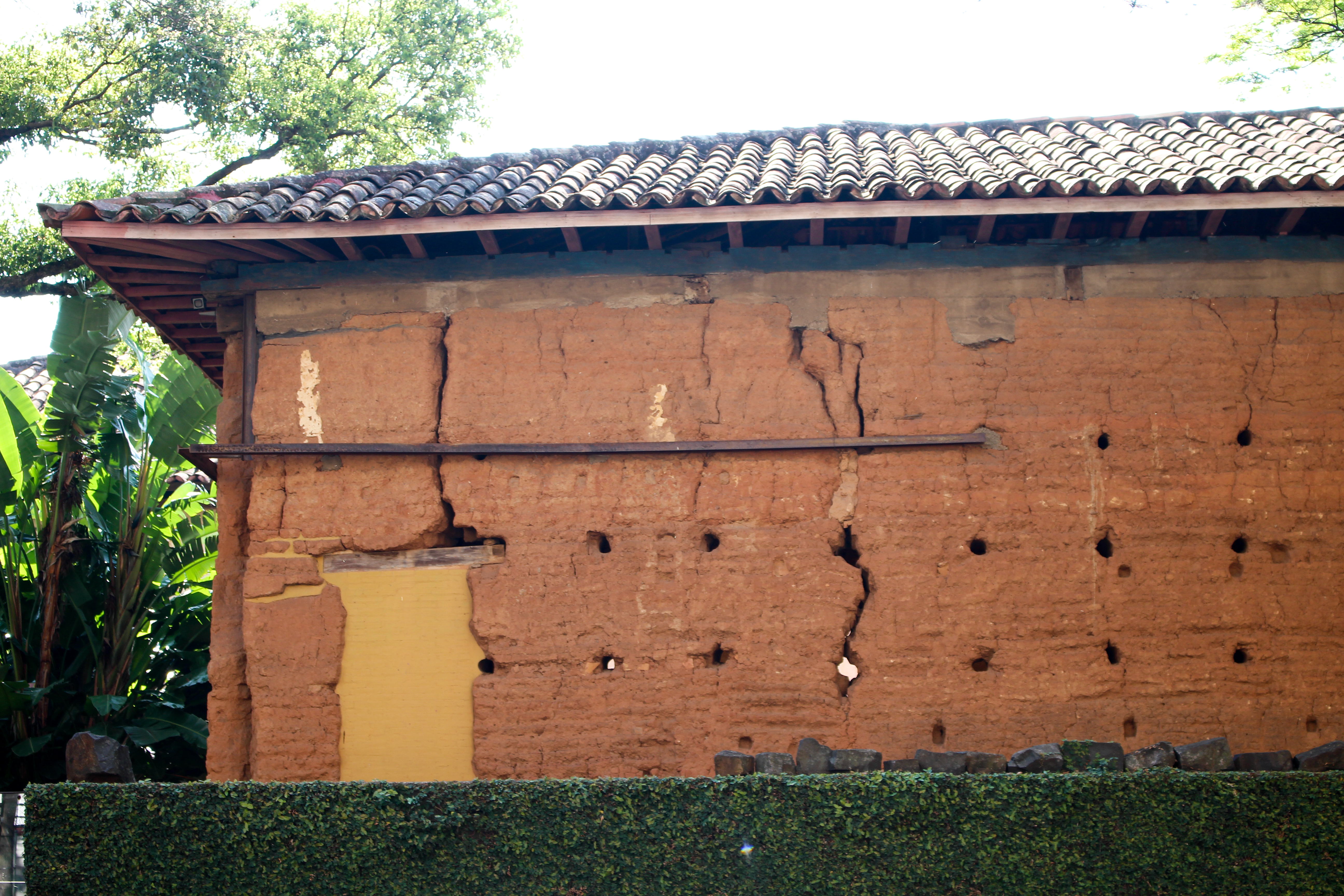 Casa Grande e Tulha da Antiga Chácara do Paraíso das Campinas Velhas, situada na Avenida Arlindo Joaquim de Lemos, 1300